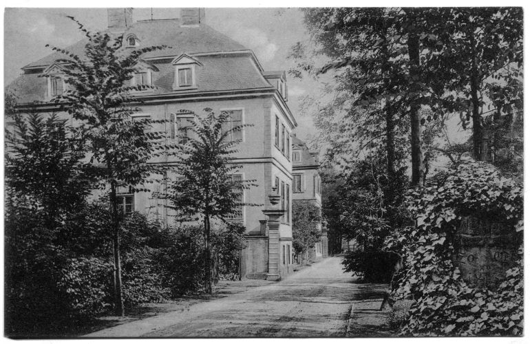 Blick um 1900 entlang der Südseite des Lindener Schlosses ...